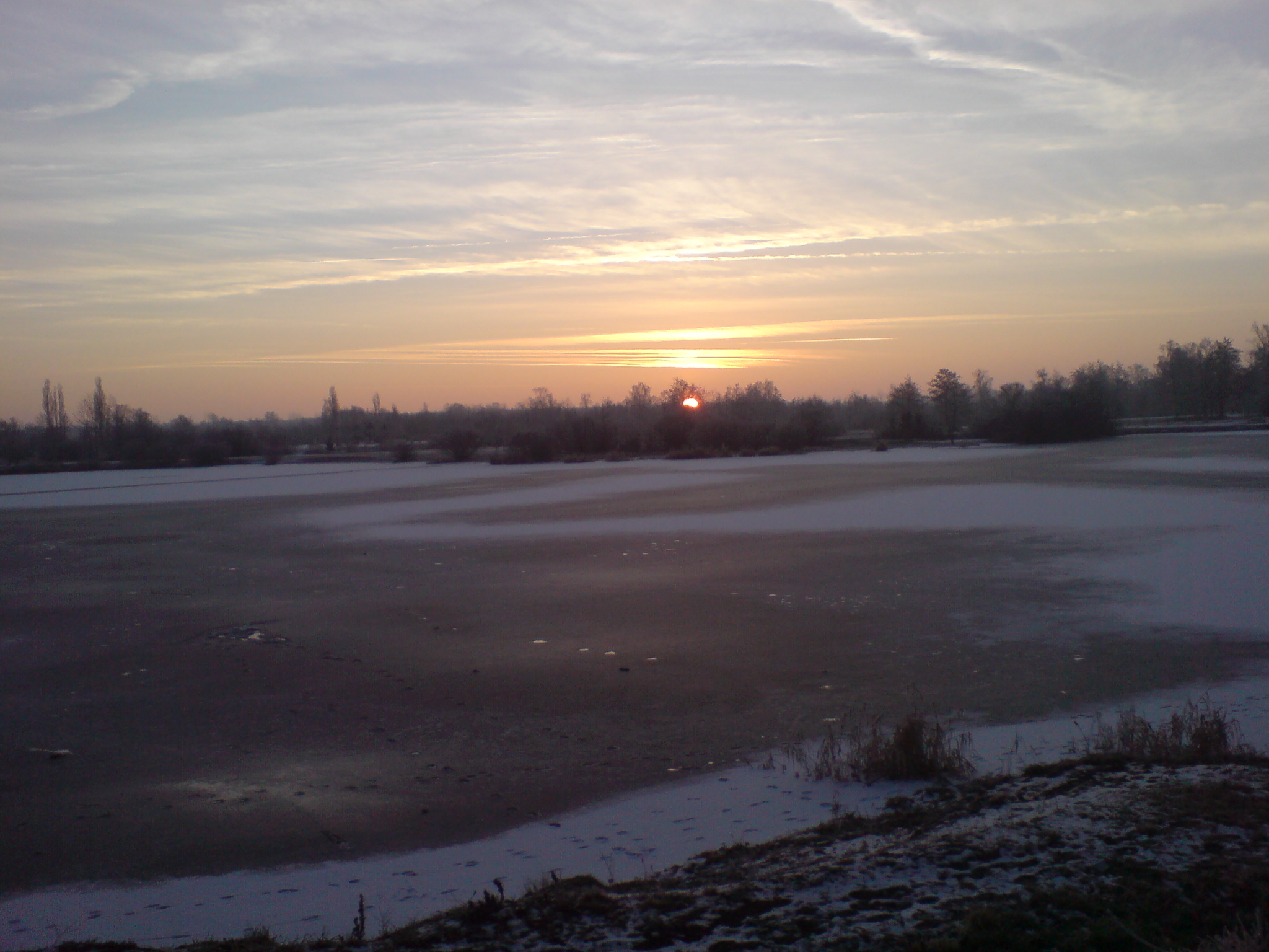 Etang gelé à Lure